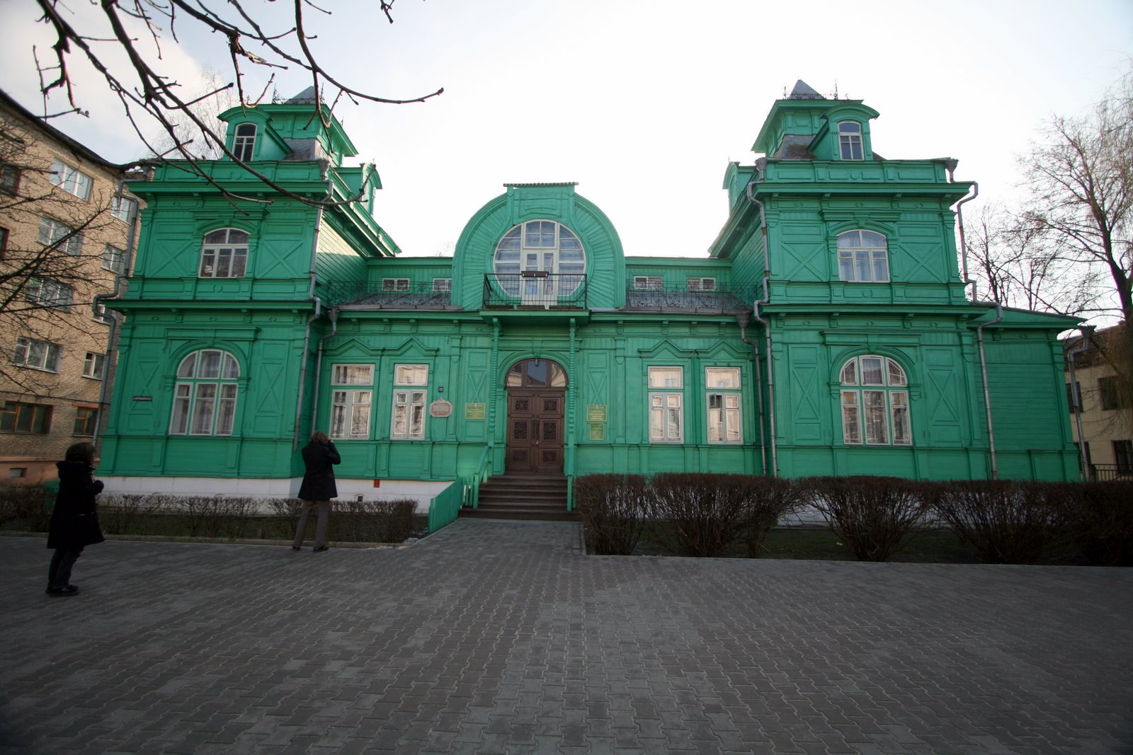 Babruysk